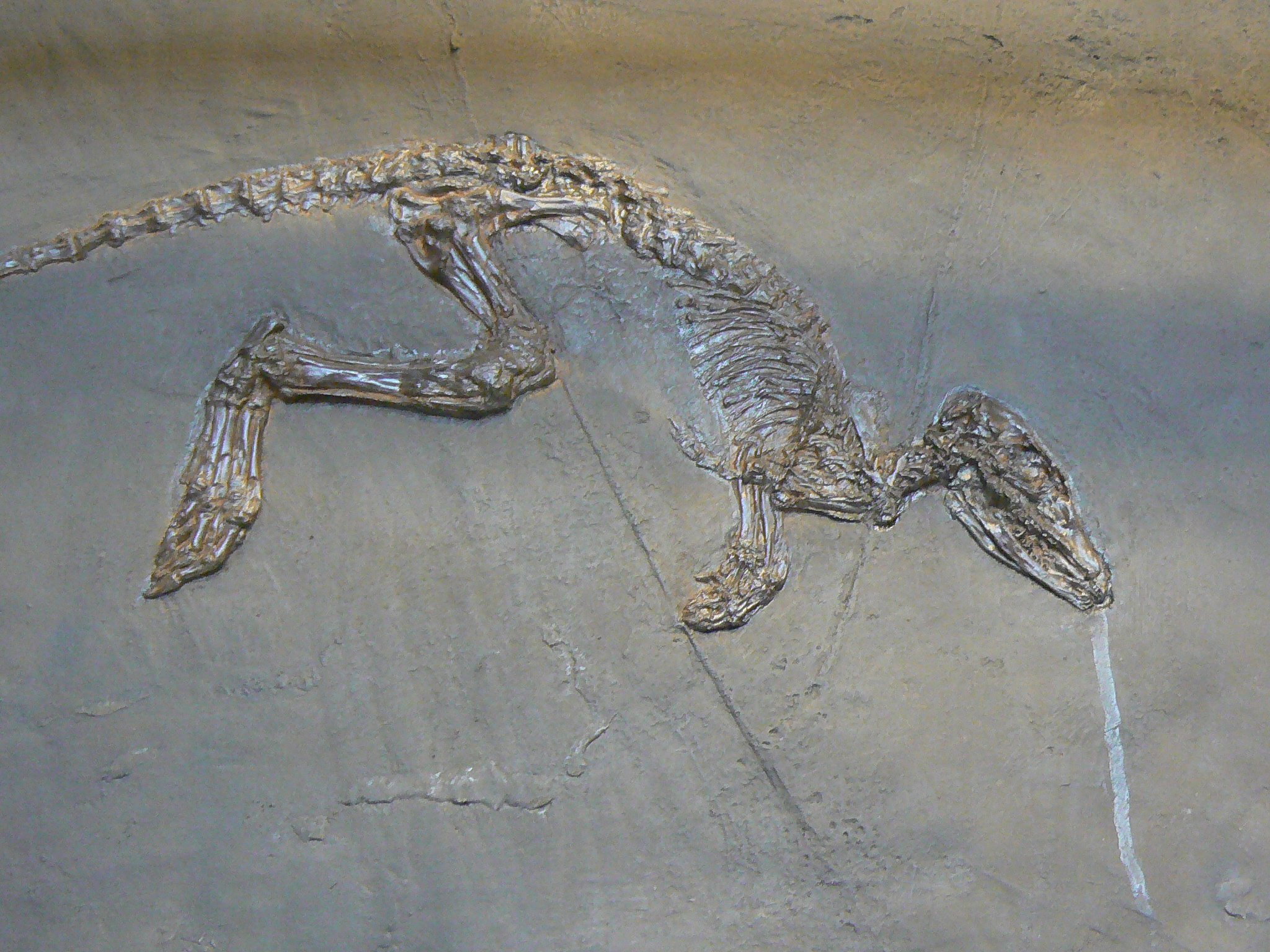 Leptictidium auderiense "insectivora leptarctidae"